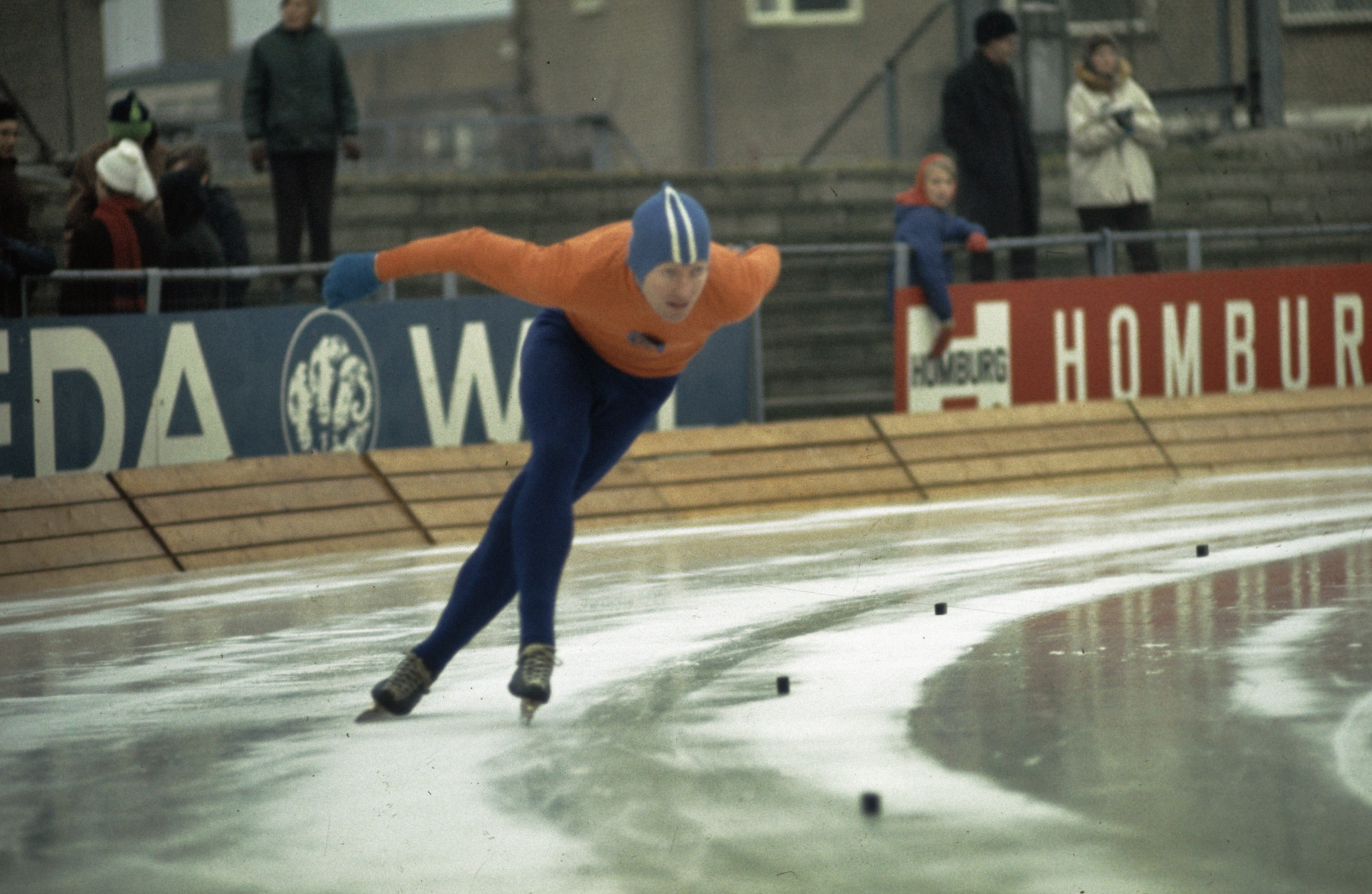 Wedstrijden om de IJsselcup in Deventer. Peter Nottet in aktie.